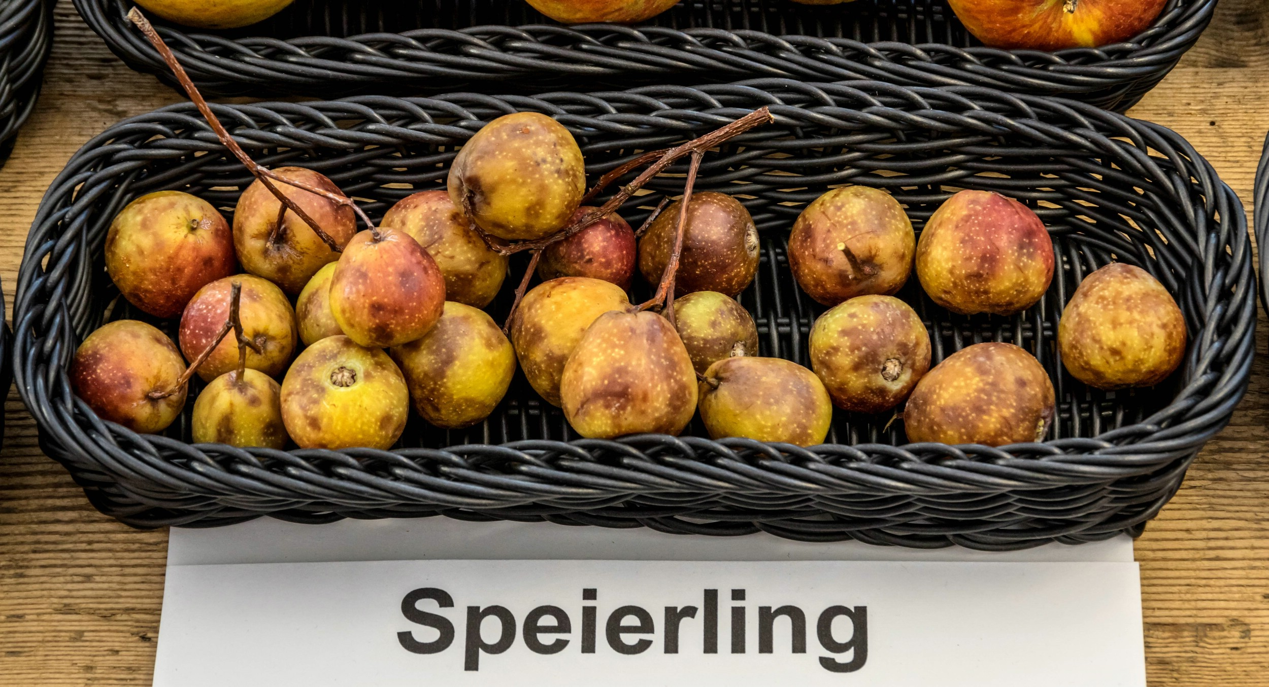 Alte Apfelsorten, von denen es im Badischen noch tragende Bäume gibt. Alle Aufnahmen au dem Oktober 2015